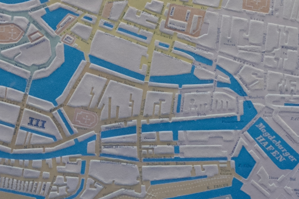 Ausschnitt mit der Insel Grimm aus einem Stadtplan des Verlags C. R. Brunnarius (Paris) von 1841. Die orangenen Straßen liegen im Kirchspiel St. Katharinen (III), die grünen Straßen im Kirchspiel St. Nicolai, die gelben Straßen im Kirchspiel St. Petri und die weißen Straßen im Kirchspiel St. Jacobi.